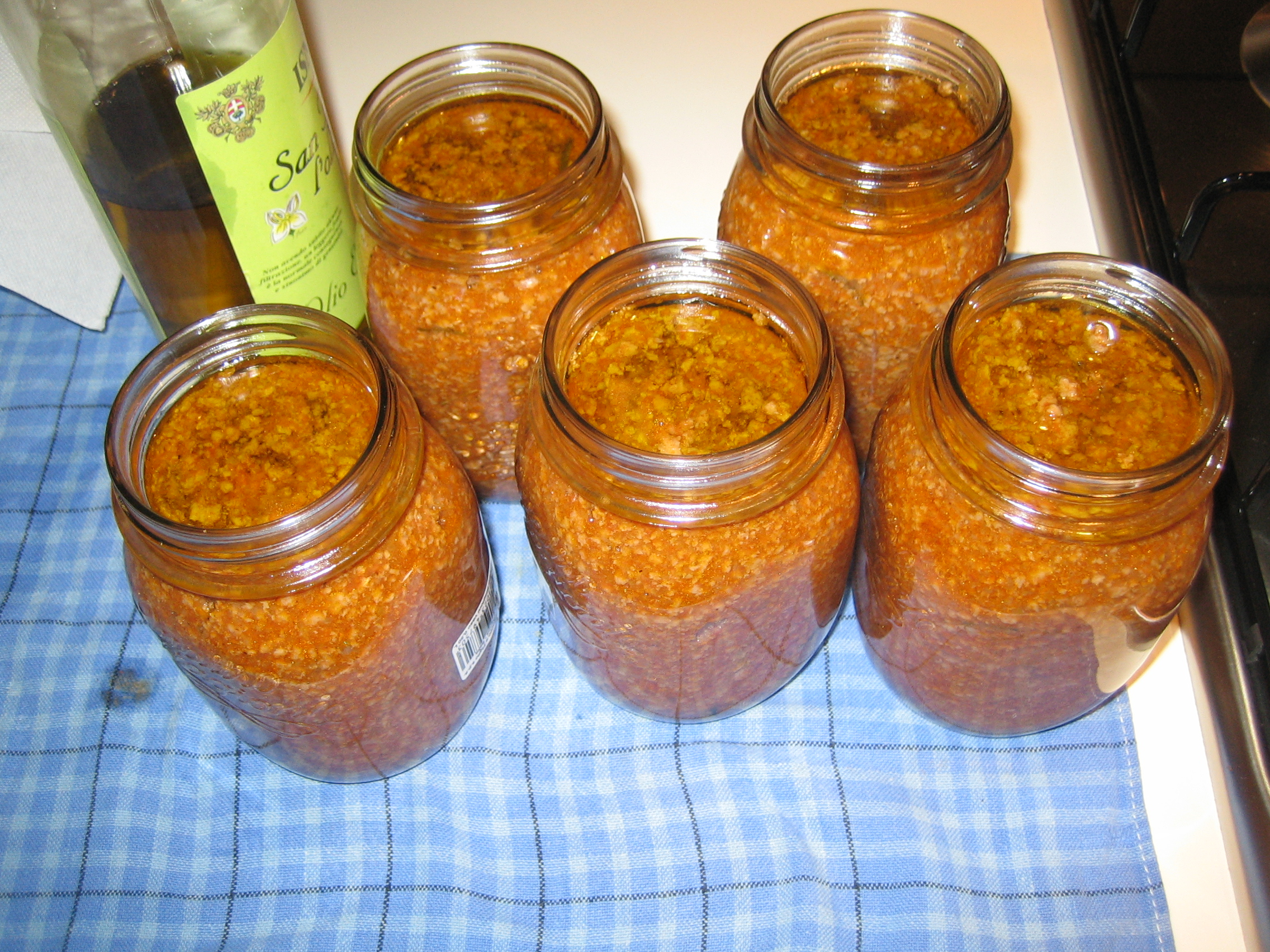 Preparazione ragù di carne/Vasetti